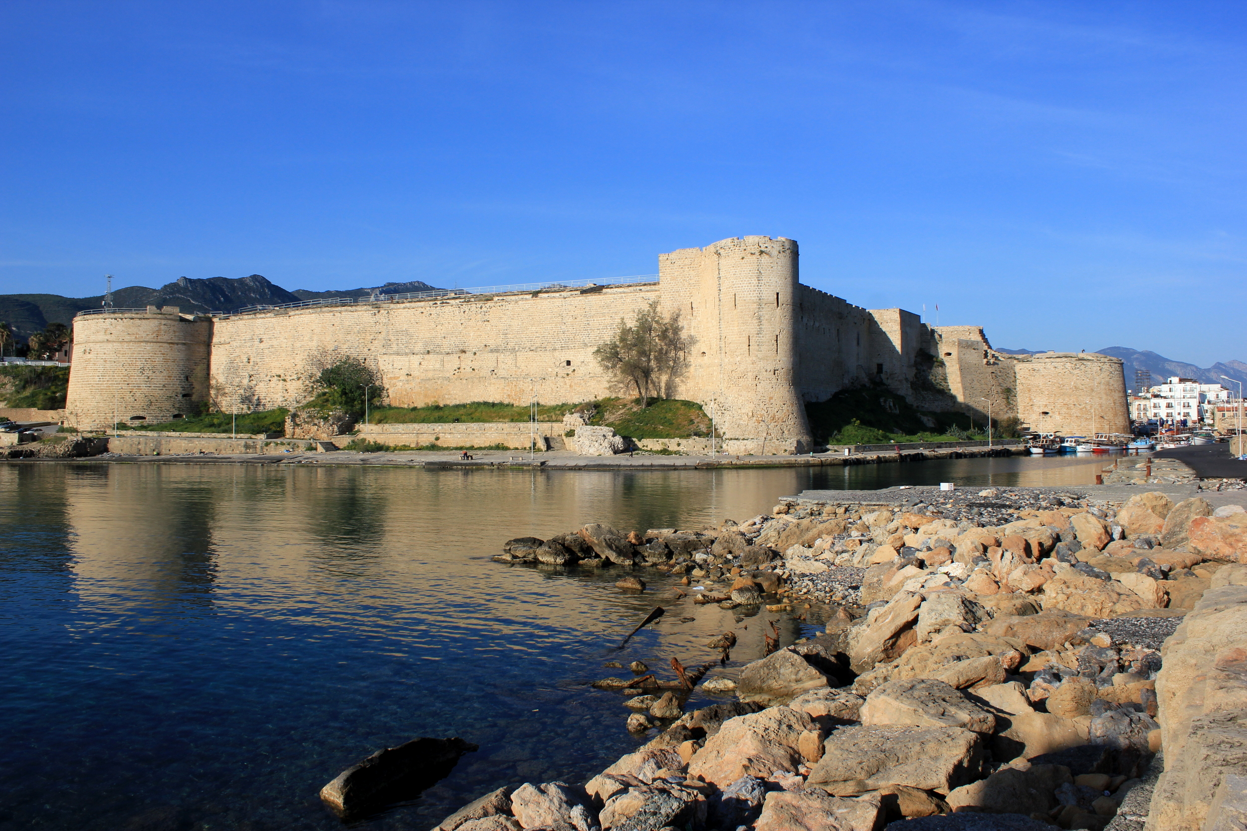 Festung in Kyrenia (Girne) in Nordzypern.